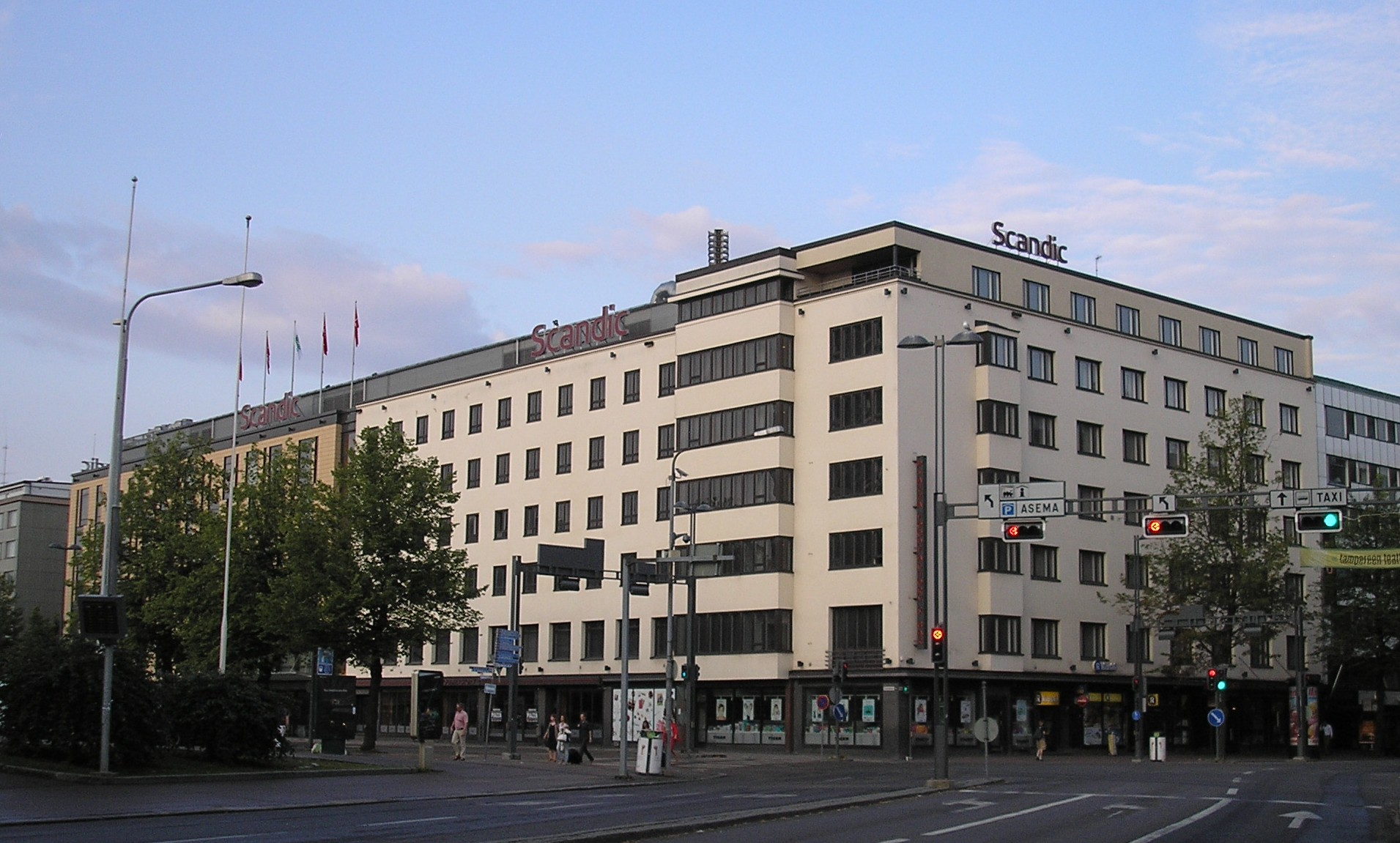 Hotelli Scandic Tampere City Hämeenkadun ja Rautatienkadun risteyksessä elokuussa 2014. Keskellä vuonna 1936 valmistunut Hotelli Emmauksen talo, jonka suunnittelivat arkkitehti Bertel Strömmer ja rakennusmestari Heikki Tiitola. Puiden taakse jää hotellin myöhemmin rakennettu lisäosa.